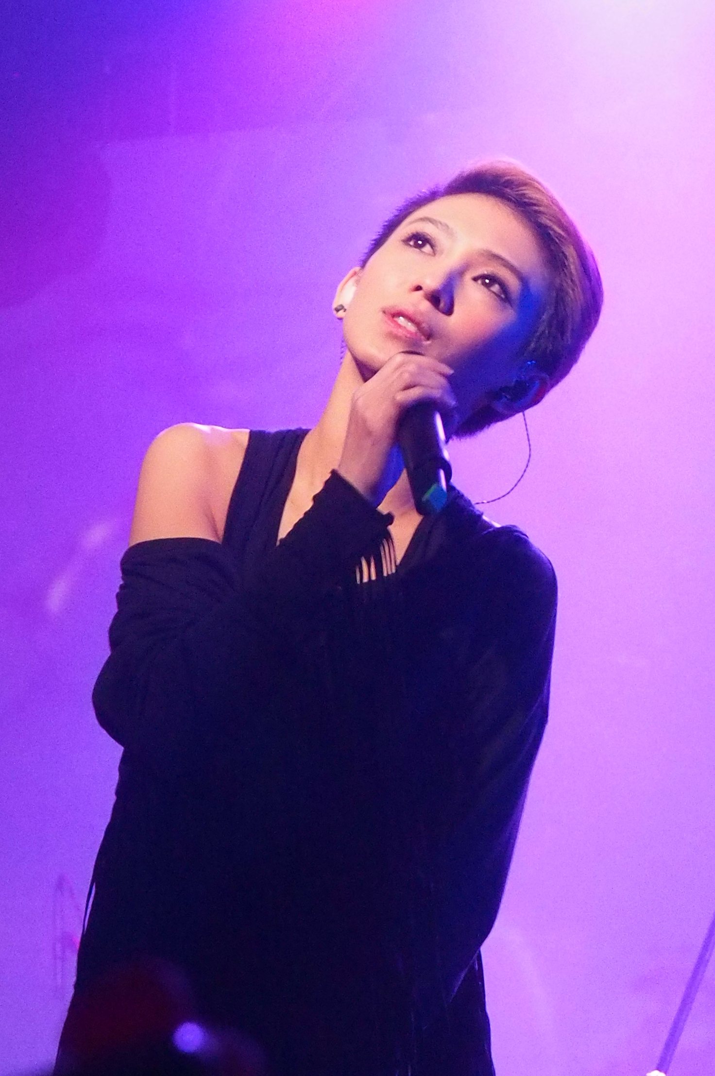 佛跳牆樂團主唱戴佩妮(Penny Tai)。